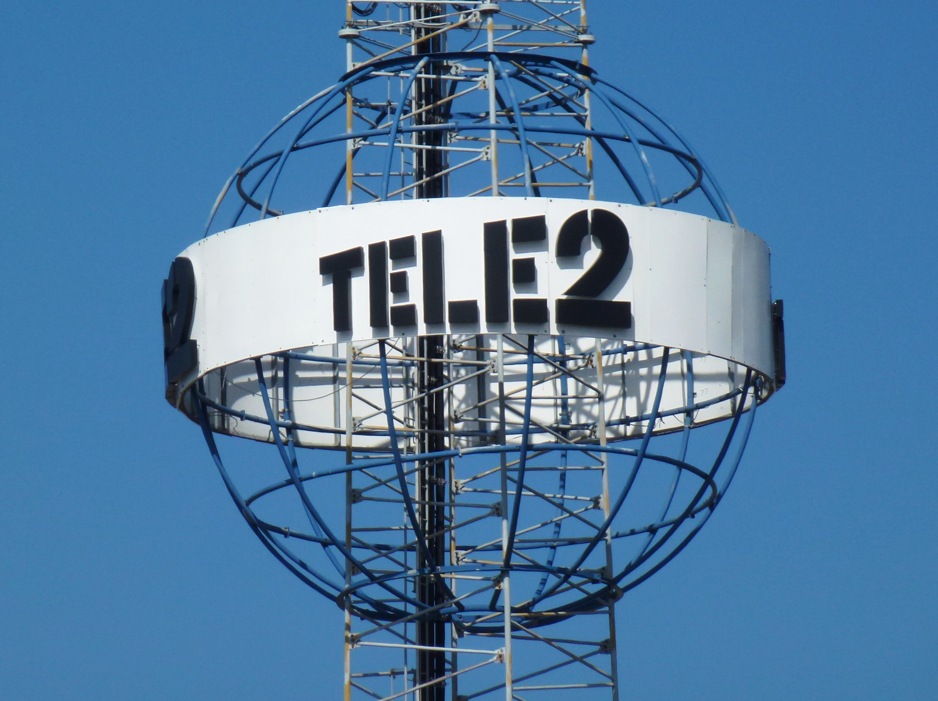 Tele 2 - tornet i Bredäng